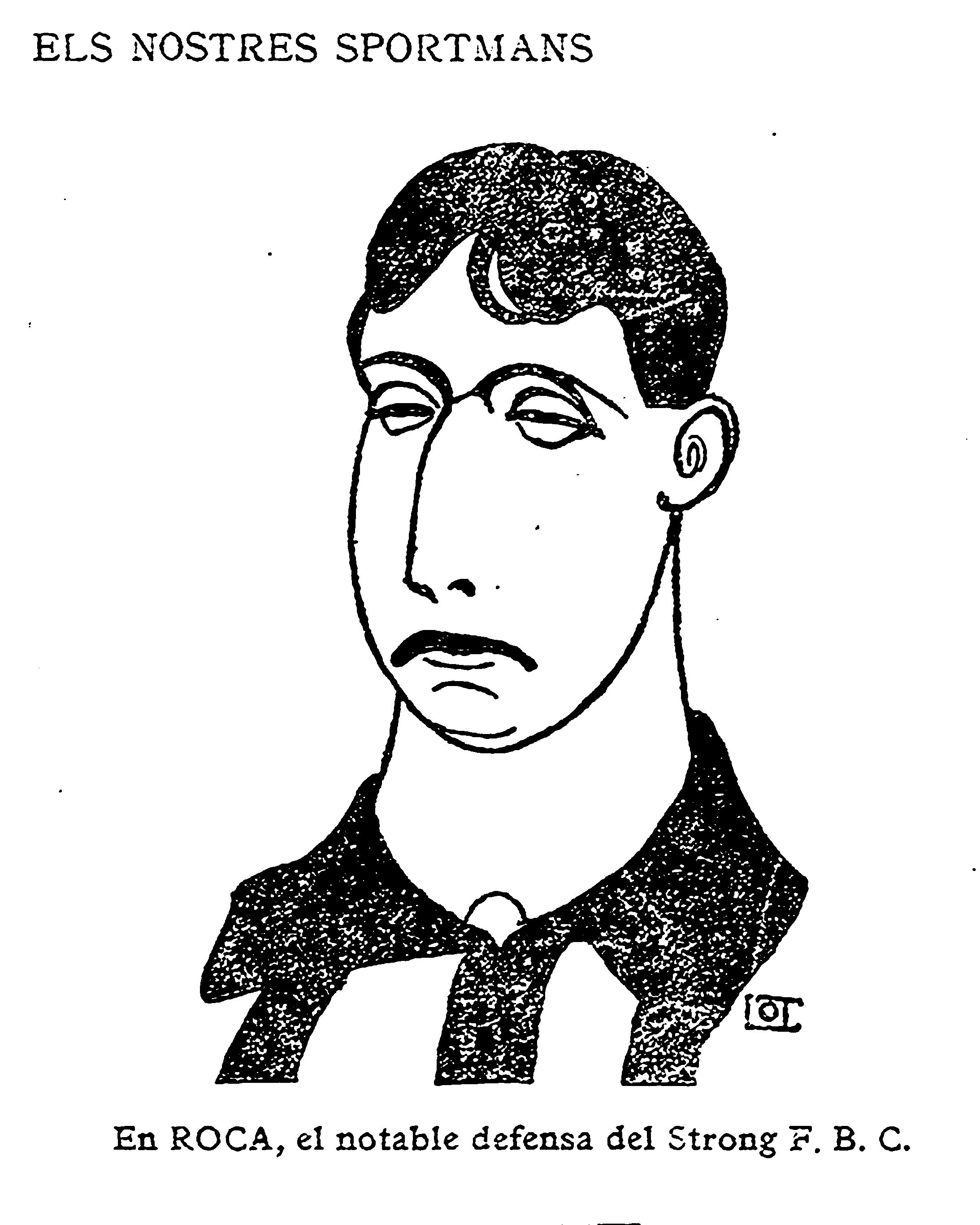 Una caricatura periodística del gran defensa Francesc Roca. Revista Aiguaforts, 1914.